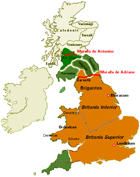 Mapa de Gran Bretaña, Siglo II DC